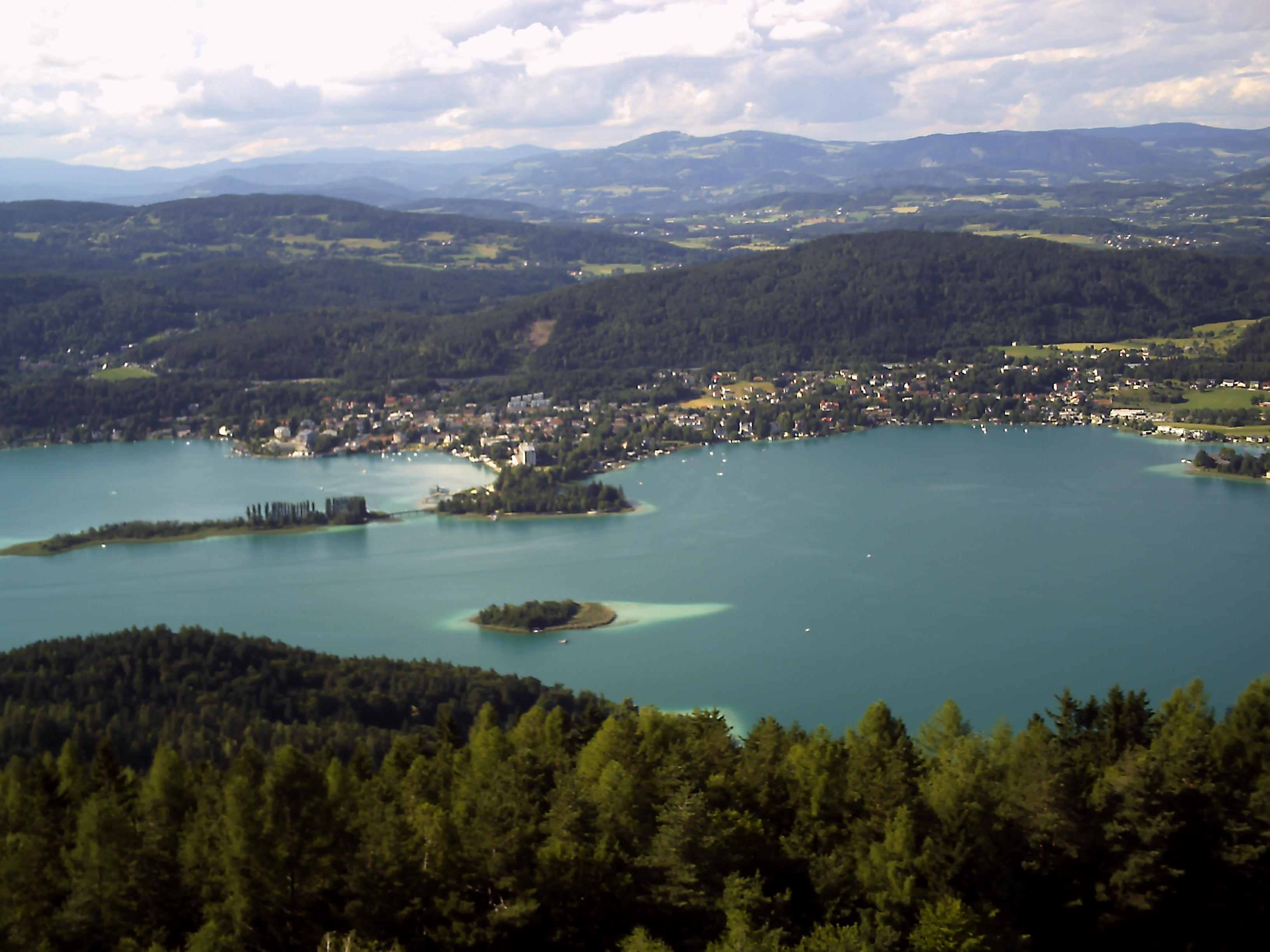 Pörtschach asm Wörthersee mit der Blumeninsel (Schlnageninsel) links im Bild